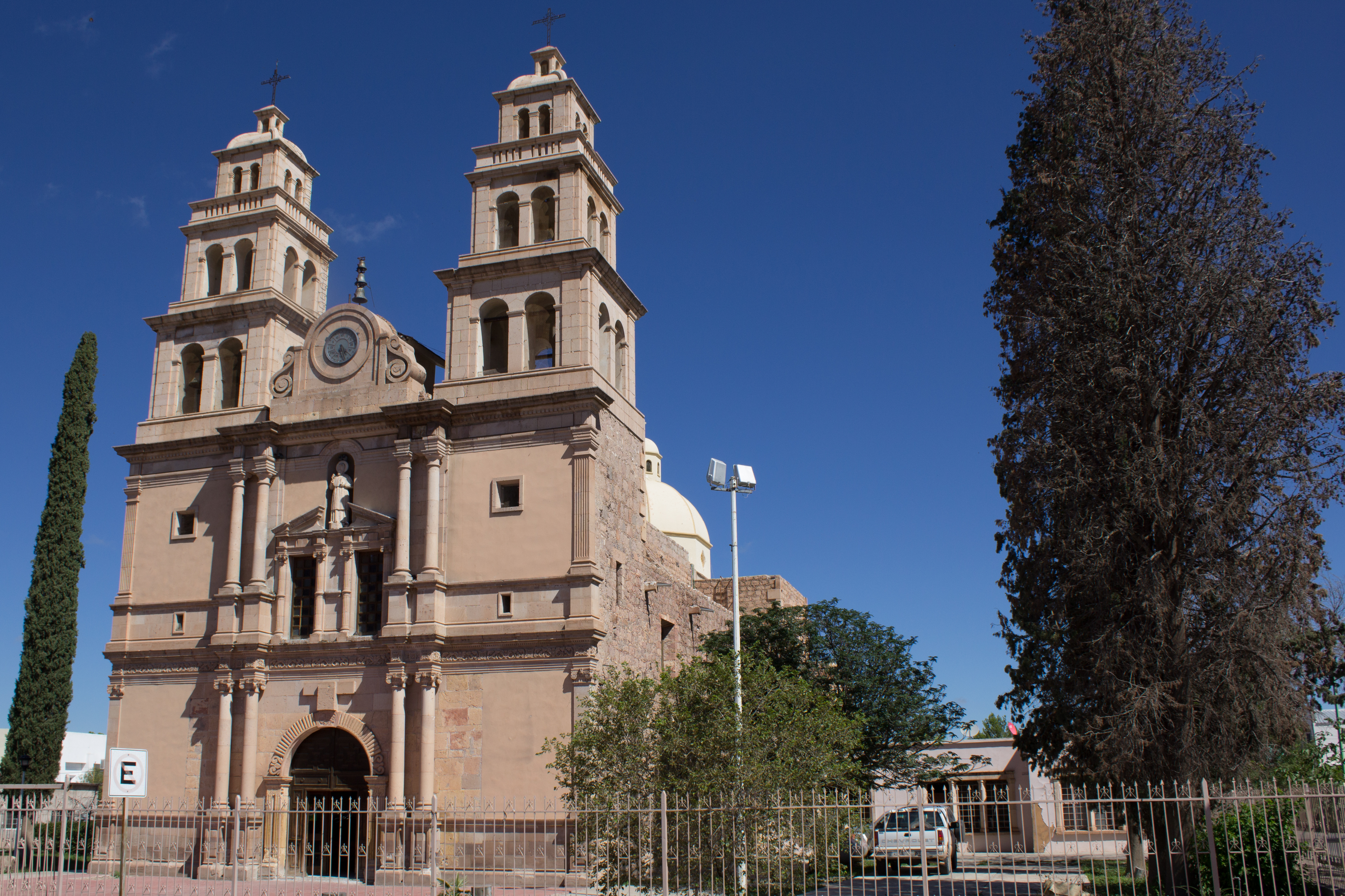 Fachada del templo ubicado frente a la plaza principal de Aldama